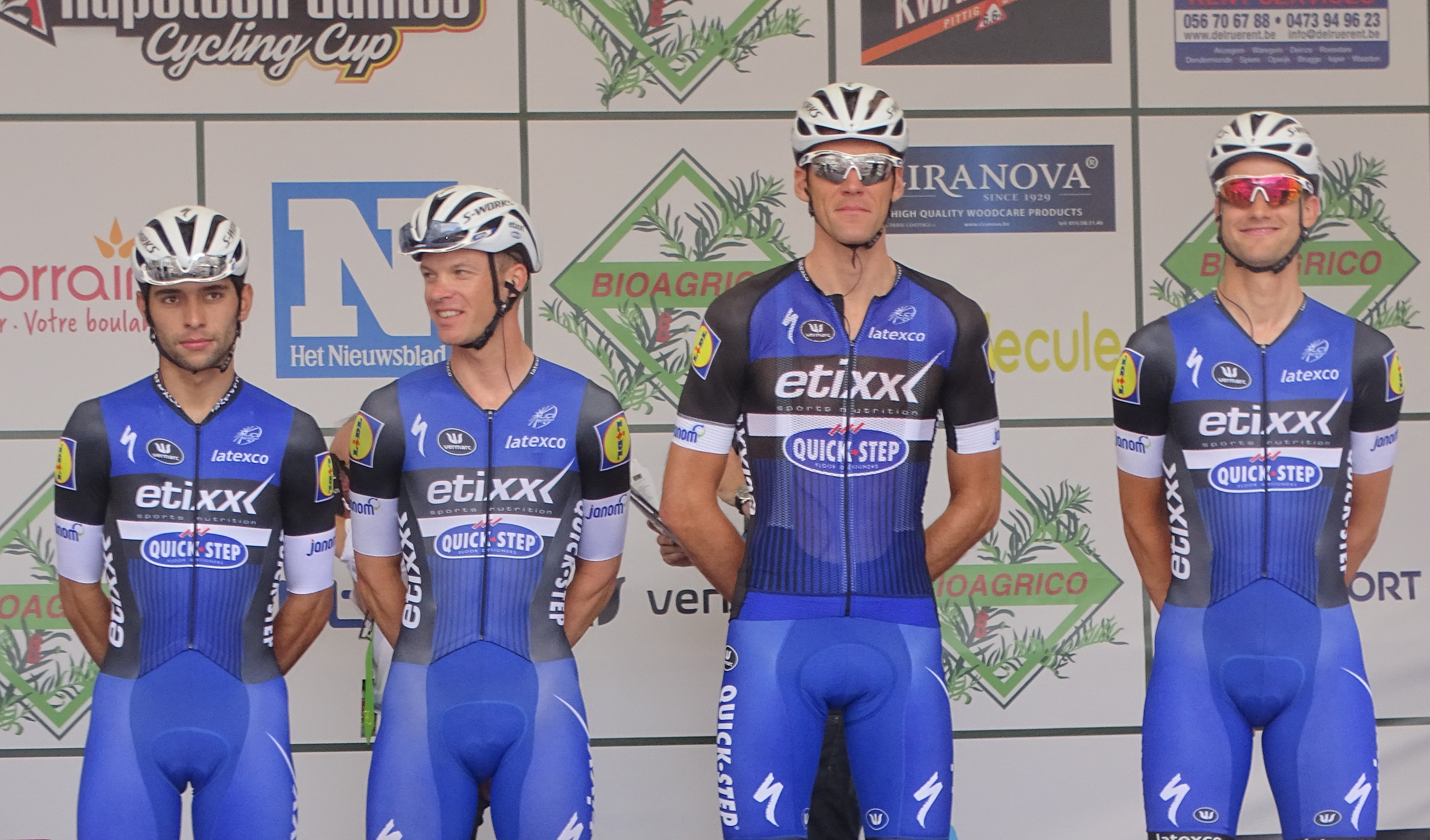 Reportage réalisé le mercredi 22 juin à l'occasion du départ de Halle-Ingooigem 2016 à Hal, Belgique.